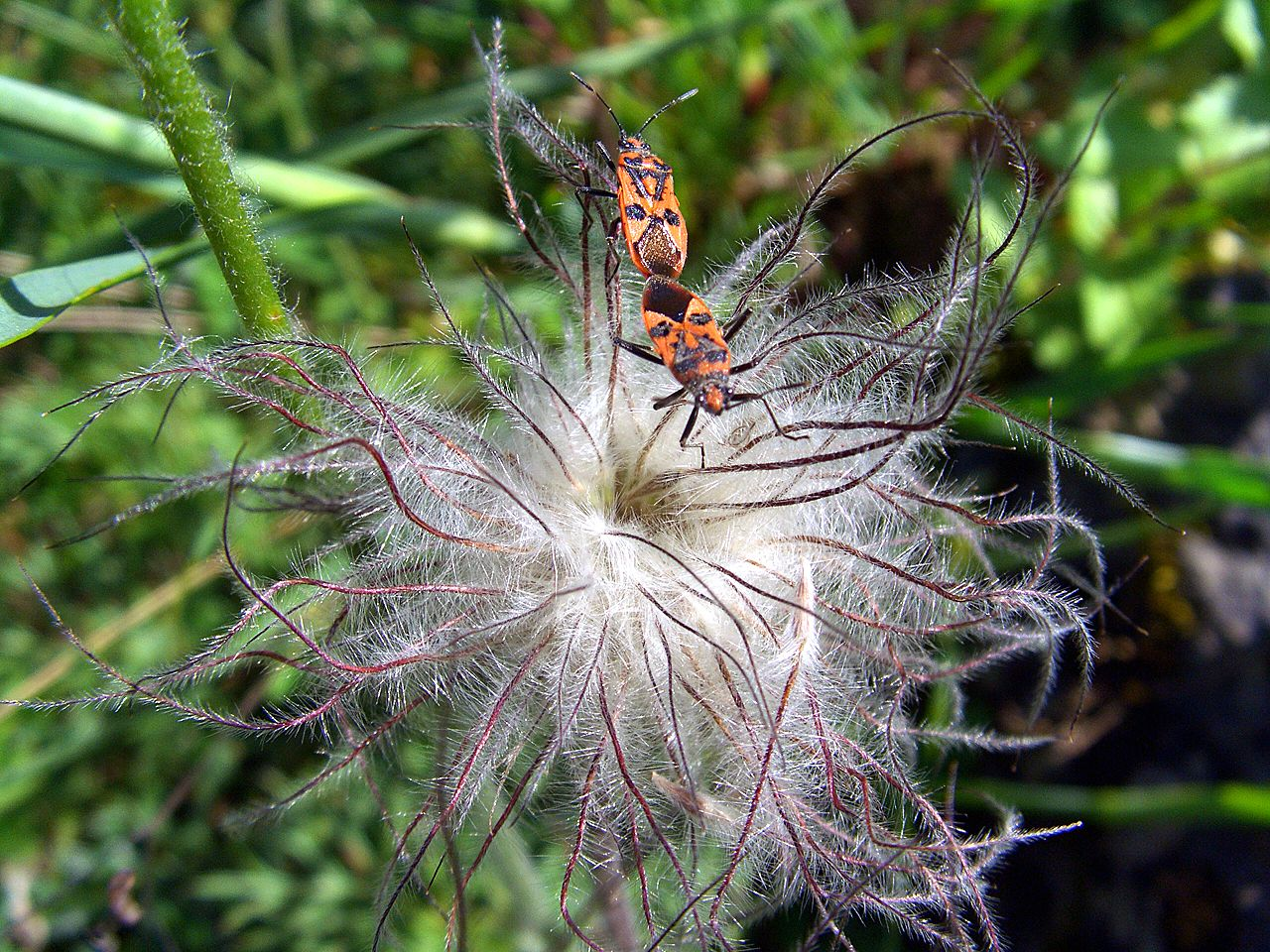 Pulsatilla vulgaris mit Corizus hyoscyami